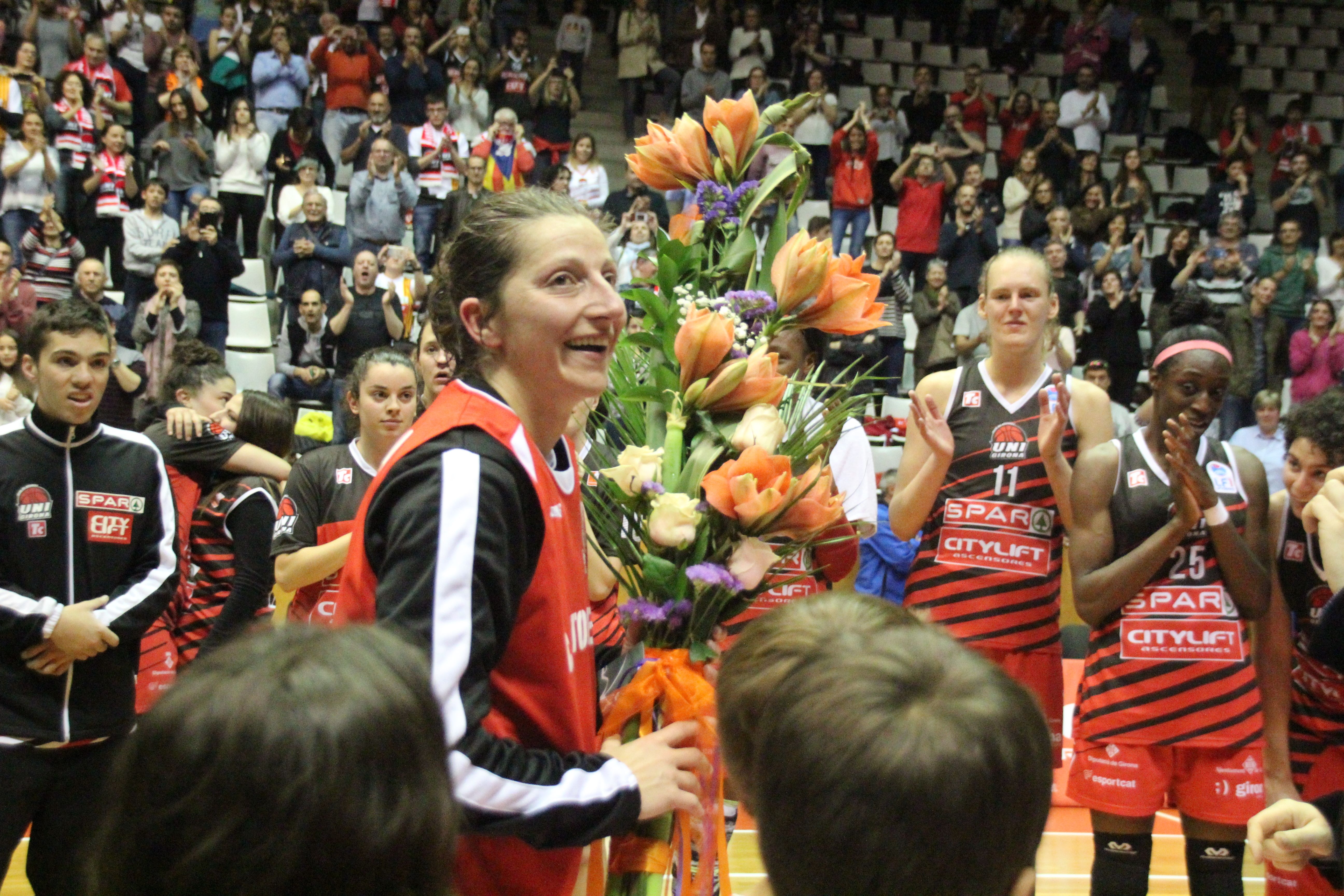 Fotografia Noemí Jordana